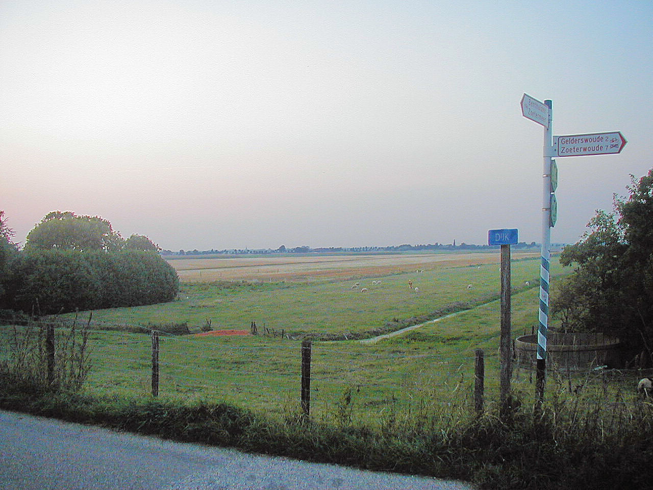 Description Uitzicht op de polder ten noorden van Benthuizen vanaf de Dijk. In de verte het buurtschap Gelderswoude. Date4 September 2003SourceOwn workAuthorMike SpaansPermission (Reusing this file) Volgens licentie; altijd oorspronkelijk auteur vermelden Uitzicht op de polder ten noorden van Benthuizen vanaf de Dijk. In de verte het buurtschap Gelderswoude.